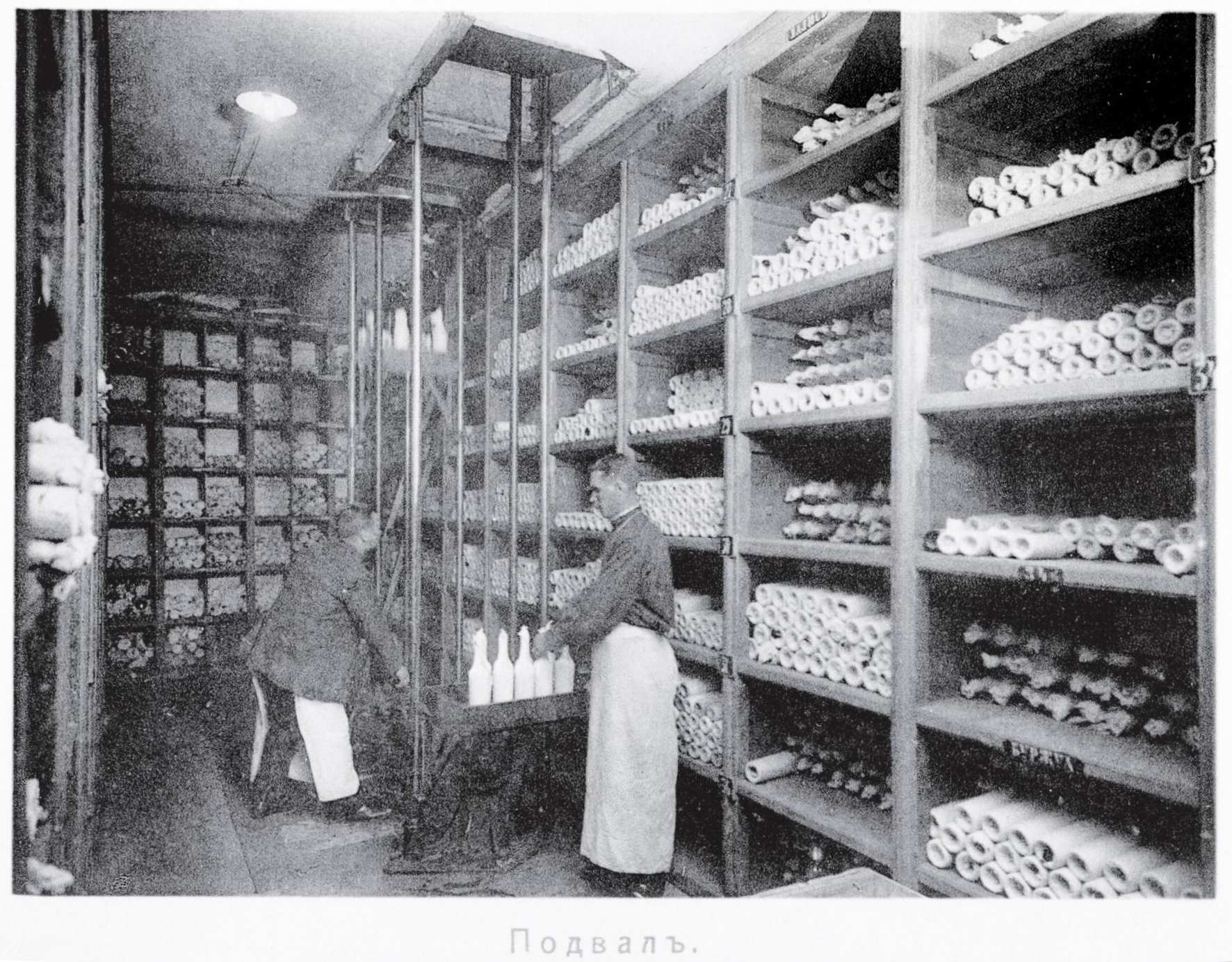 Магазин Елисеева и погреба русских и иностранных вин. Винный погреб